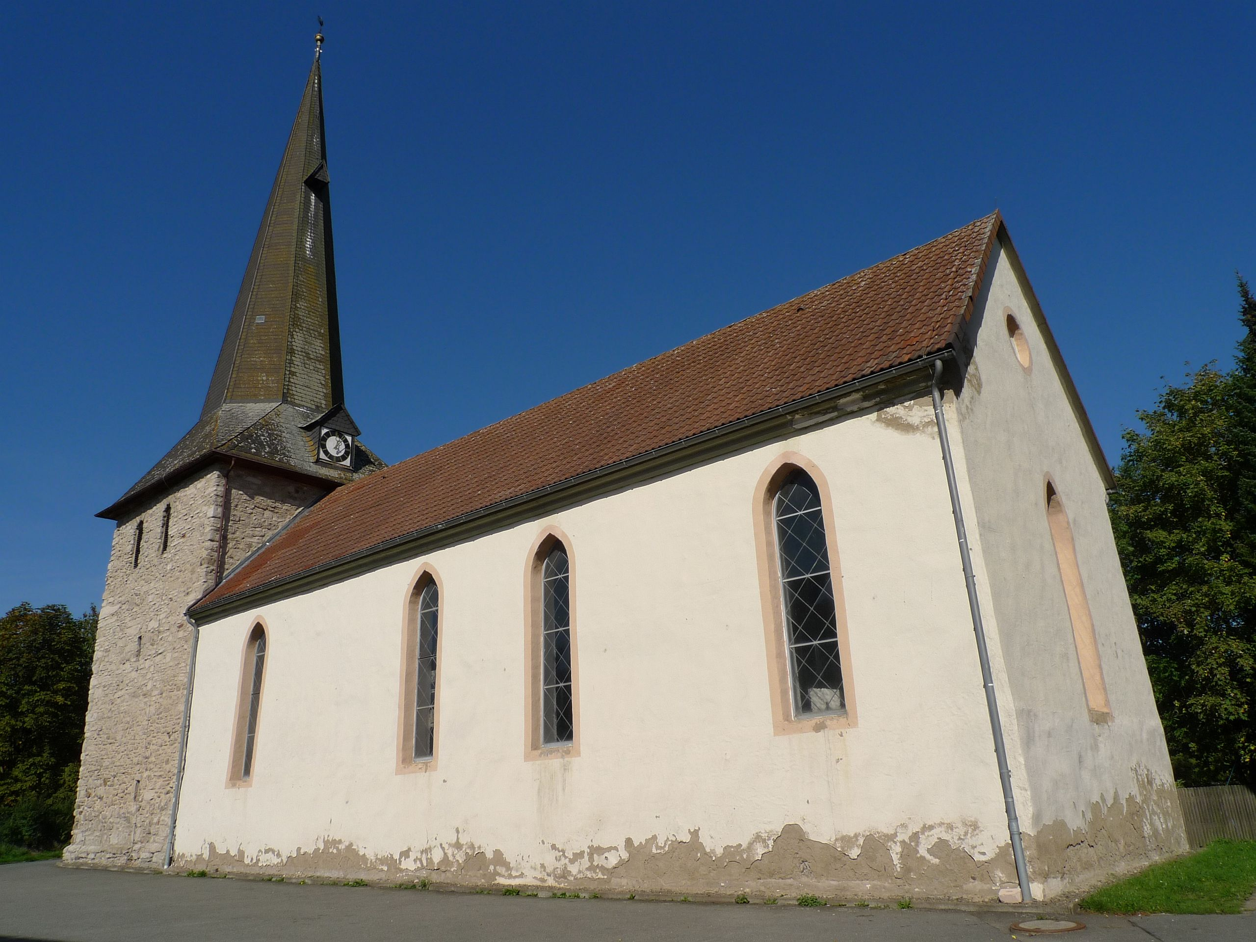 Evangelische St. Bartholdi Kirche in Bartolfelde, einem Ortsteil von Bad Lauterberg